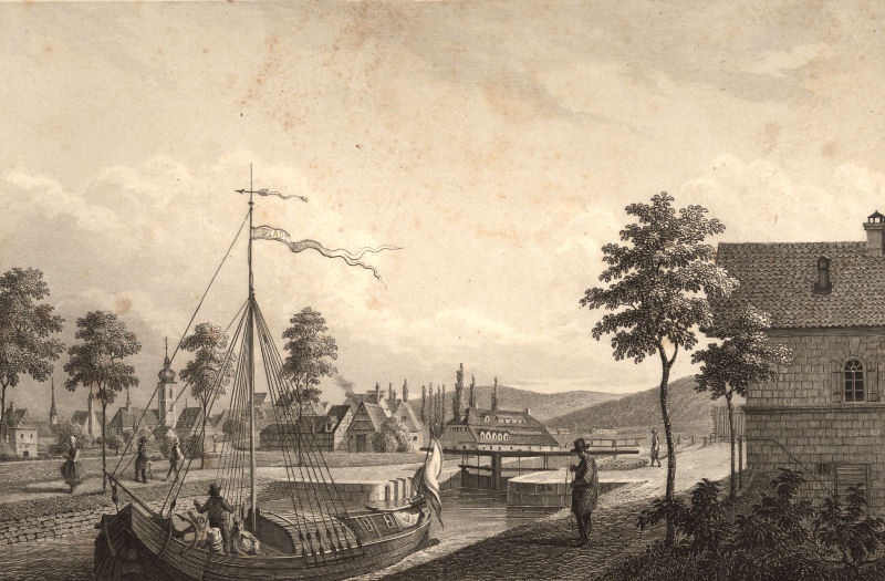 Schleuse bei Forchheim. Stahlstich von Alexander Marx aus dem Buch Pittoreske Ansichten des Ludwig-Donau-Main-Kanals. Gezeichnet, auf Stahl gestochen und herausgegeben von Alexander Marx. 1845. Kupferstecher in Nürnberg.